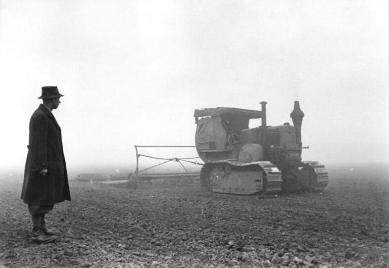 Hadmersleben, Herbstbestellung Illus Biscan Wa-Ho. 14.11.1951 Herbstbestellung. Auf den Feldern des Saatzuchtgutes Hadmersleben bei Magdeburg ist die Herbstbestellung im vollem Gange. Traktorist Rudolf Sofart hat vier Geräte gekoppelt und macht den Acker in einem einzigen Arbeitsgang saatfertig, Nationalpreisträger Franz Vettel, der Saatzuchtleiter des Gutes, ist täglich auf den Feldern, um die richtige Bodenbearbeitung zu überprüfen. UBz: Nationalpreisträger Franz Vettel (links) beobachtet, wie Traktorist Rudolf Sofart mit seiner 55 PS-Raupe im dichten Nebel den Acker bearbeitet.